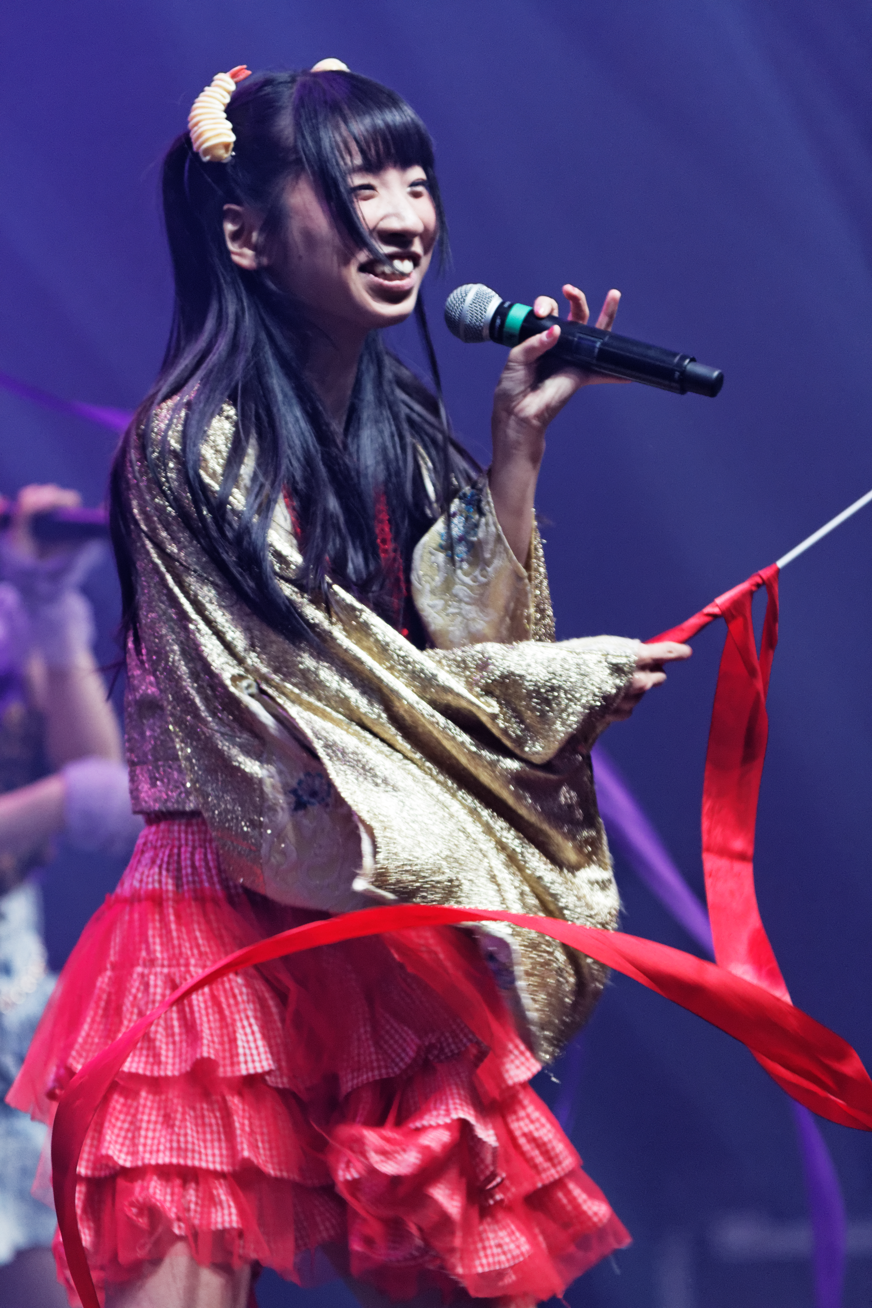 Dempagumi.inc en concert lors du live house du Japan expo Paris 2013.